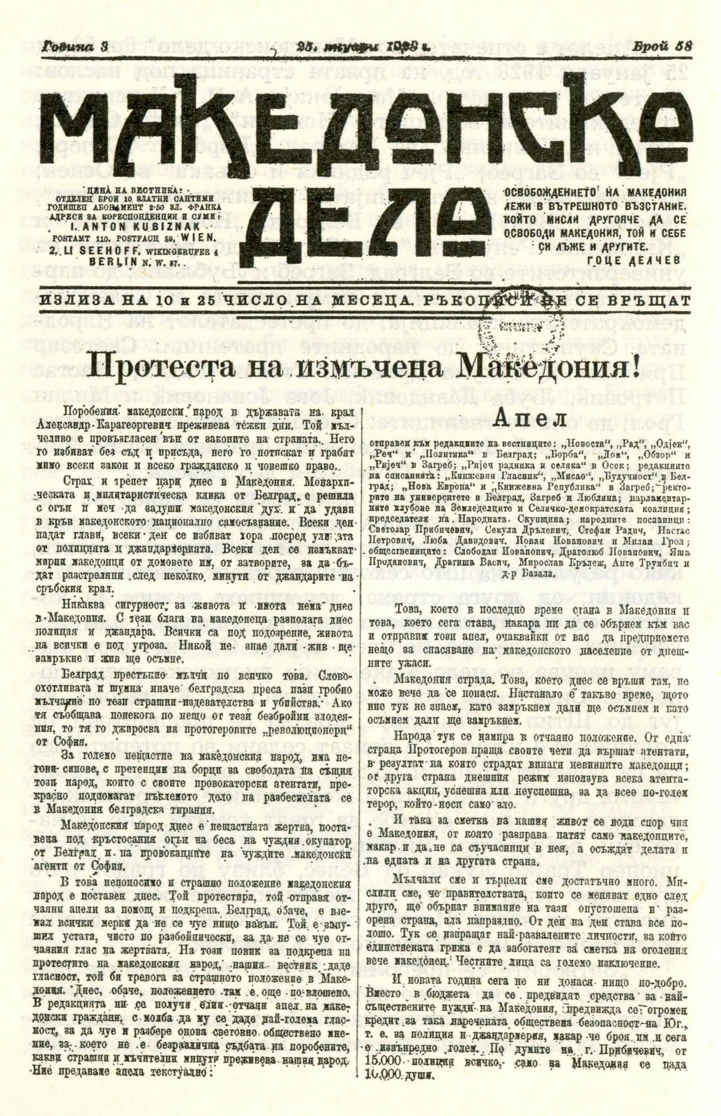 Вестникът на ВМРО (Обединена) "Македонско дело".